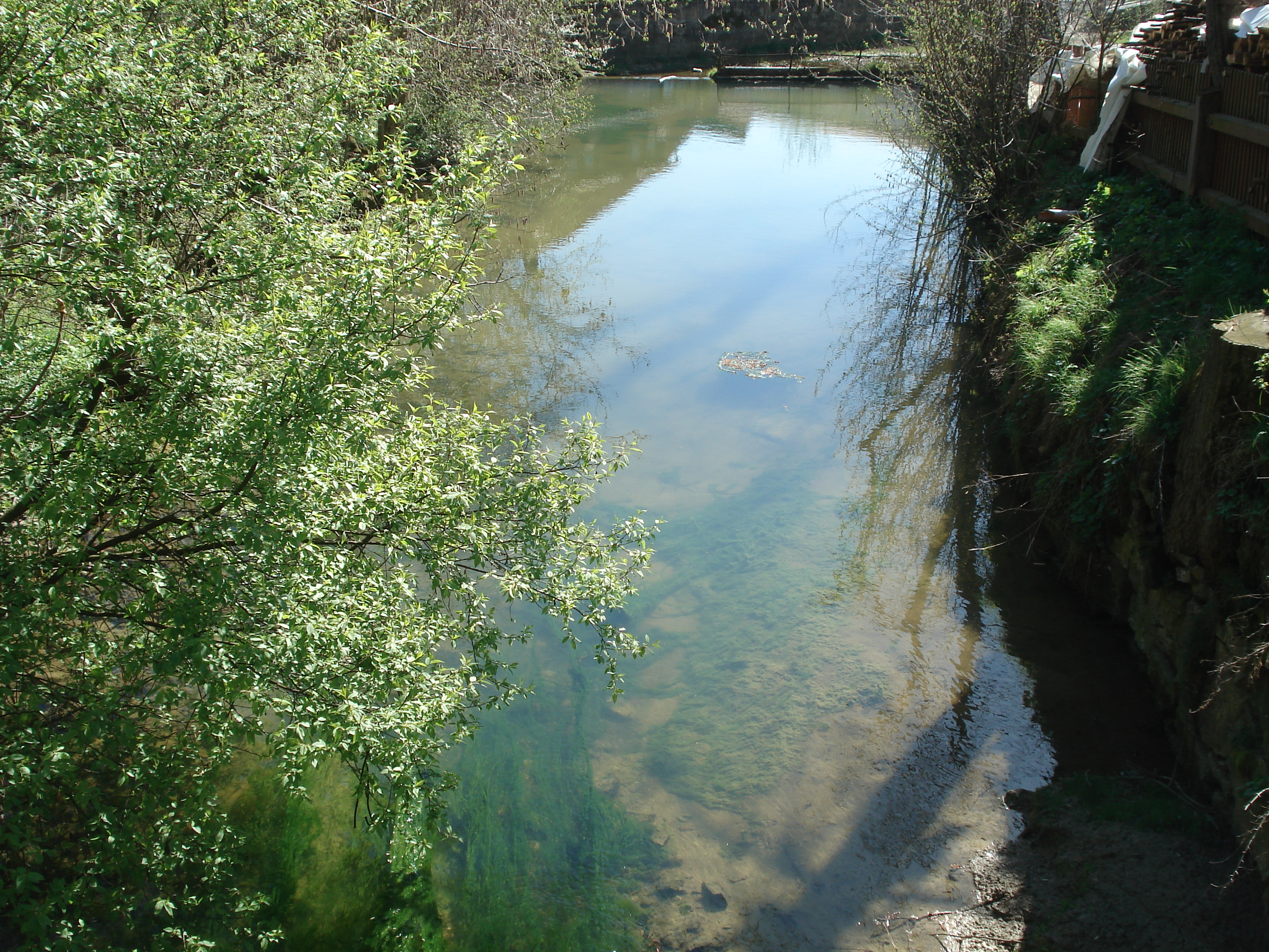 Die aufgestaute Schandtauberquelle